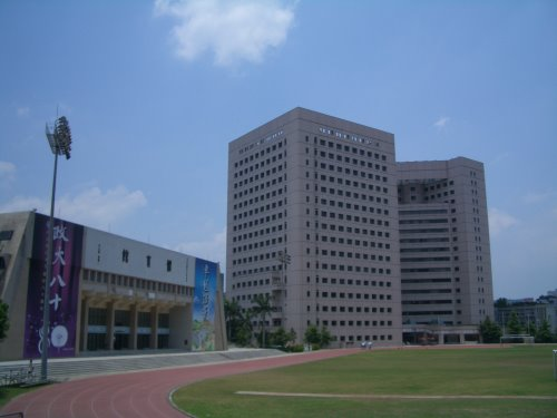 台灣政治大學校園一隅